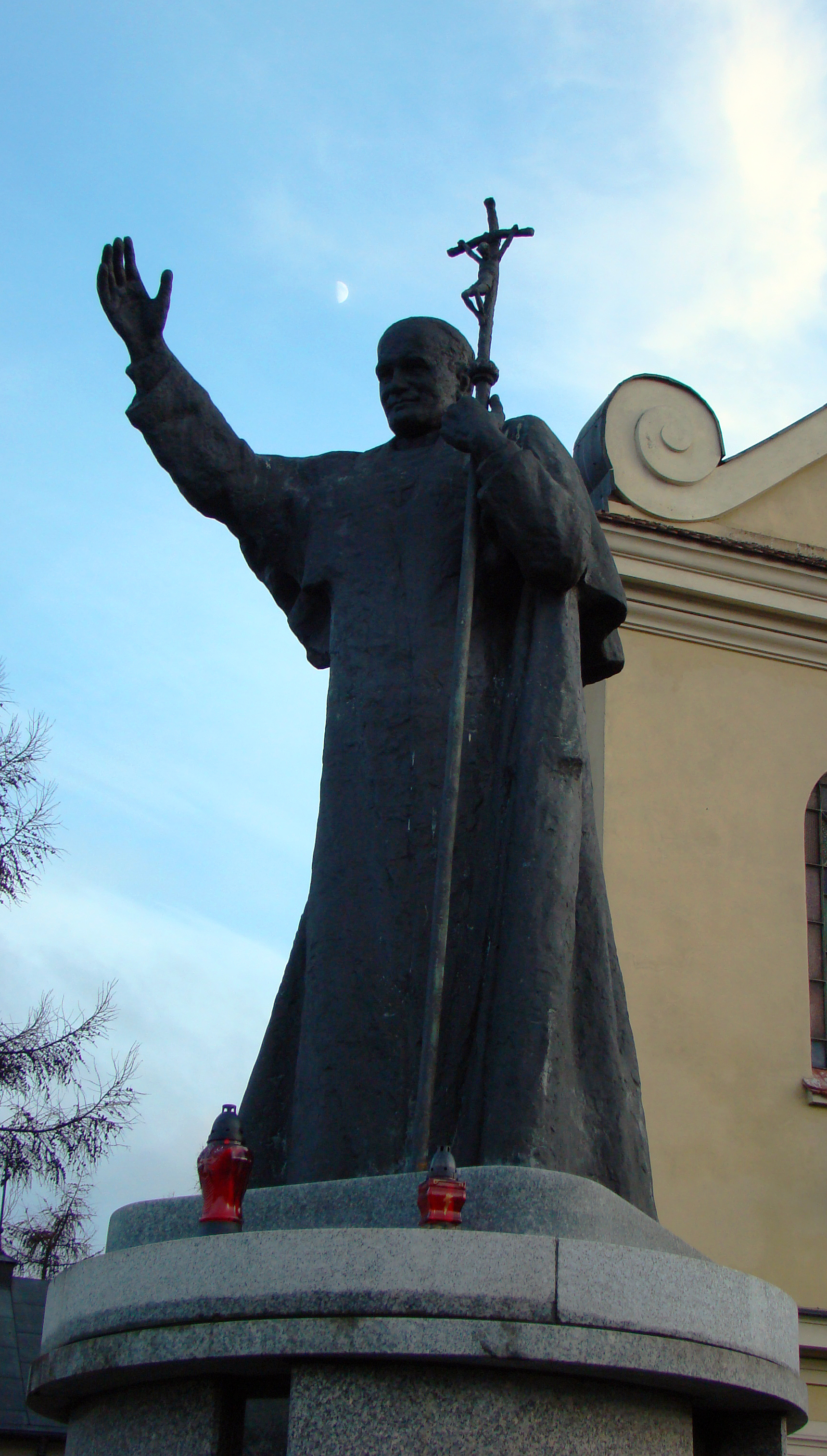 Pomnik Jana Pawła II w Aleksandrowie Łódzkim (powiat zgierski, województwo łódzkie), Polska